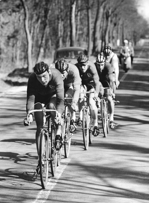 Richter, Dienewald, Drechsler, Dovatt, Thielecke Zentralbild Studré 26.3.1967 Berlin: Radsportstraßensaison 1967 eröffnet. Mit dem traditionellen Rennen Berlin-Feienwalde-Berlin über 120 km wurde am 26.3.1967 die Straßensaison der Radsportler eröffnet. Eine Sptzengruppe hatte sich schon wenige Kolometer nach dem Start gebildet und behauptete ihren Vorsprung bis ins Ziel. Sie wird angeführt von dem späteren Sieger Heinz Richter (SC Dynamo Berlin). Dahinter folgen: Steffen Dienewald, R. Drechsler, und M.-D. Dovatt (alle SC Dynamo Berlin) und G. Thielecke (TSC Berlin).